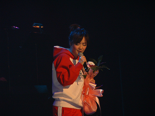 Priscilla Chan